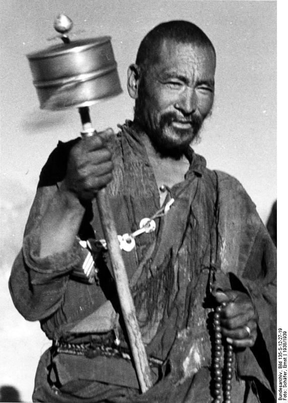 Lhasa, Lama mit Gebetsmühle